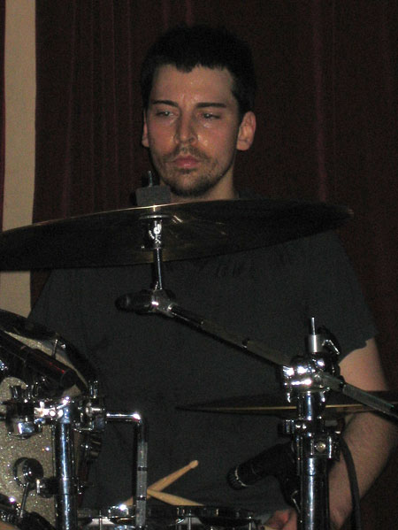 Tim Wyskida, drummer of doom metal band Khanate.